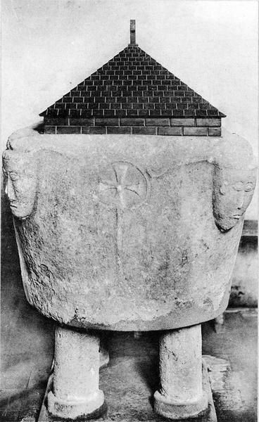 Taufstein in der Kirche in Nassigny